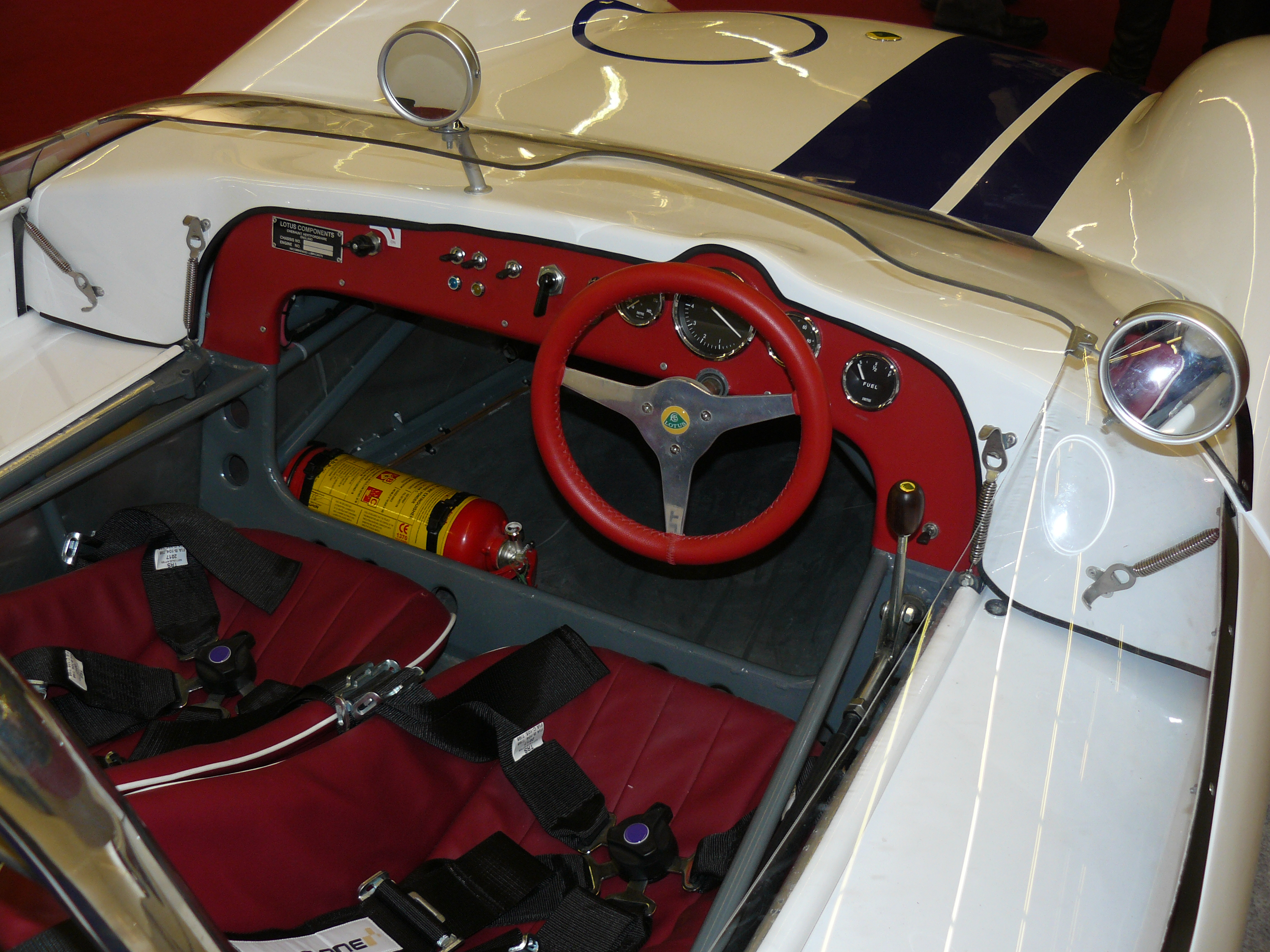 Français cadien: Retromobile 2013.